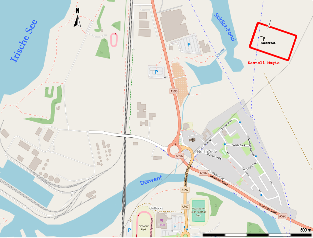 Lageskizze des Kastell Burrow Walls (Magis) in Workington (GB).